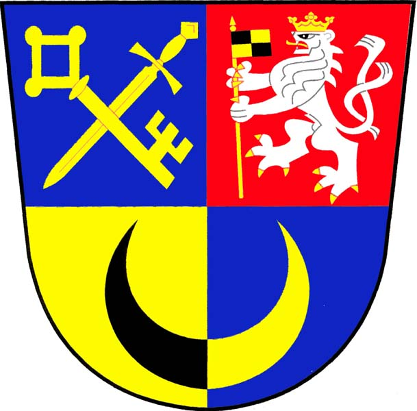 Znak obce Rozhovice